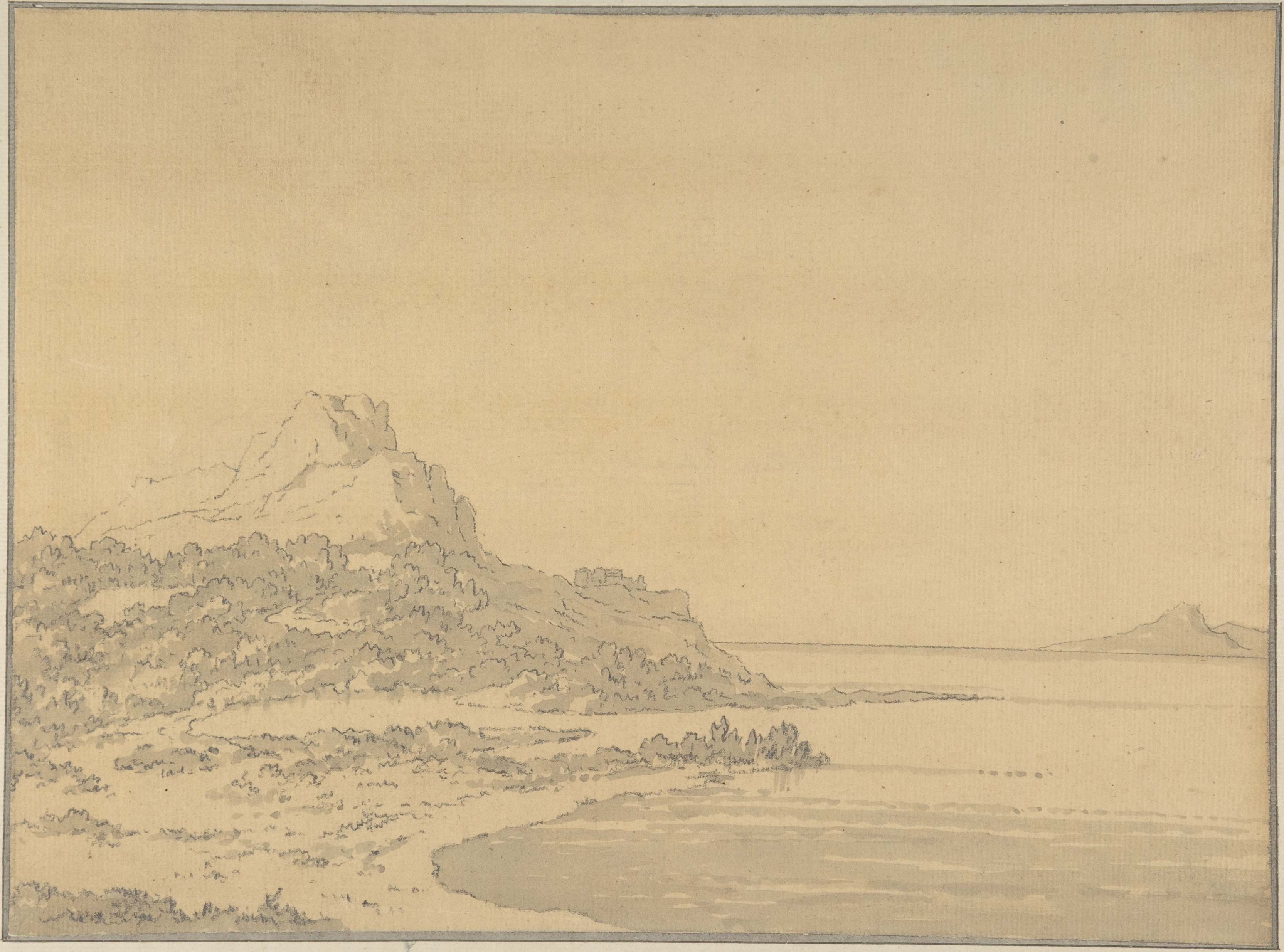 Drawing; Drawings